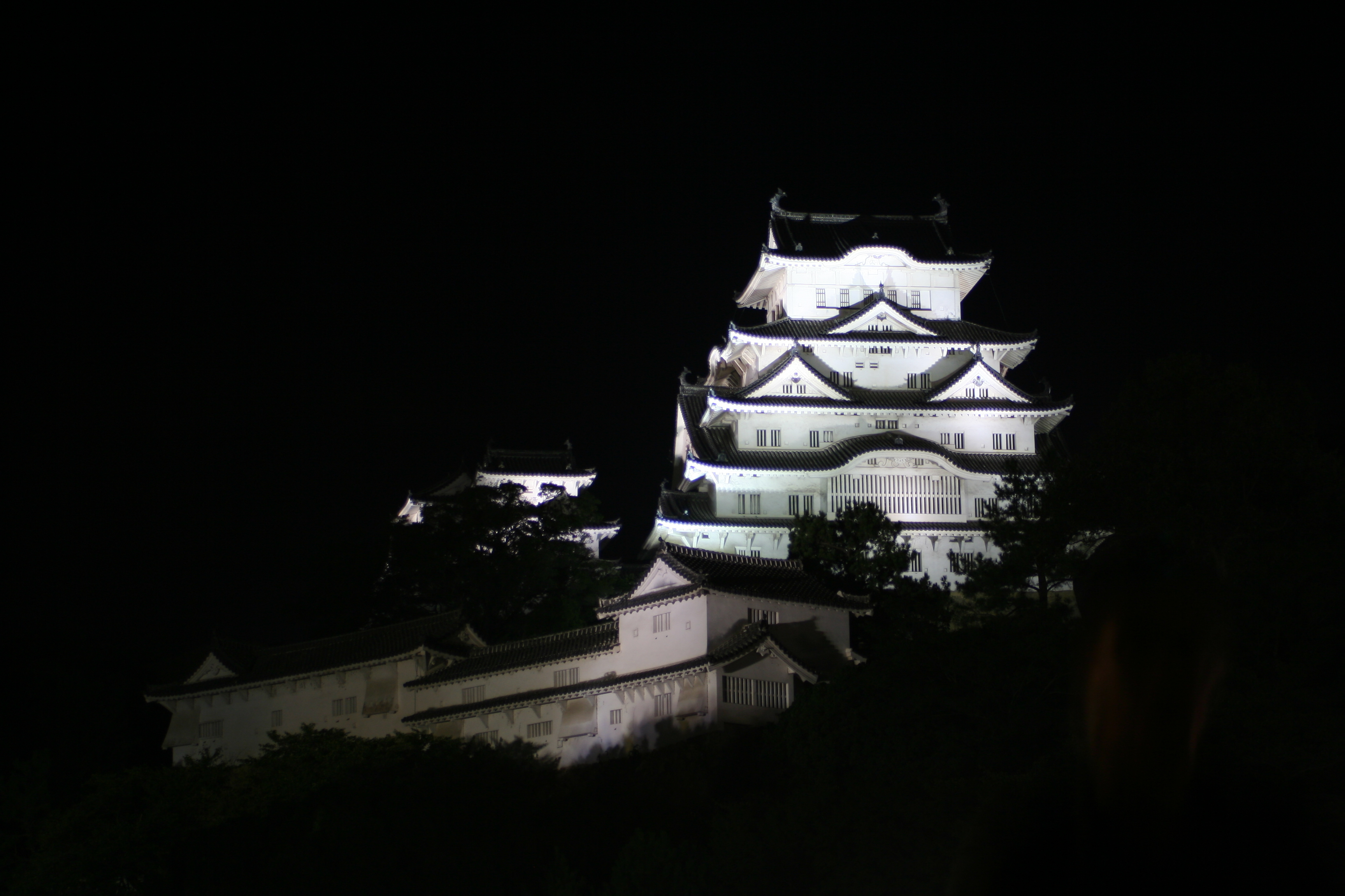 2009年10月3日に姫路城三の丸広場にて開催された姫路城観月会の模様。